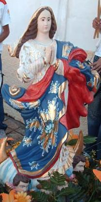 Foto que retrata a imagem padroeira da Paróquia da Imaculada Conceição de Currais Novos-RN-Brasil e que está no altar da Matriz da Imaculada Conceição.